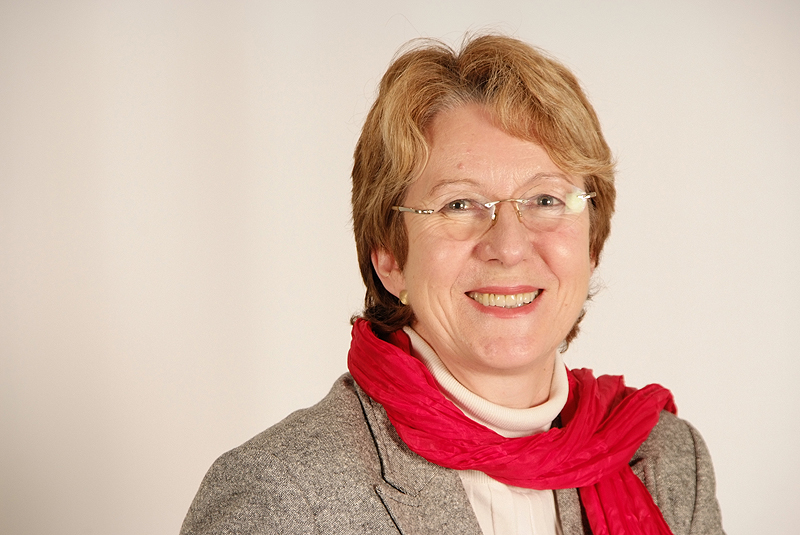 Brigitte Somfleth, Landtagsabgeordnete Niedersachsen, 16. Wahlperiode (Fotoprojekt Landtagsabgeordnete Niedersachsen am 24. und 25. November 2009)